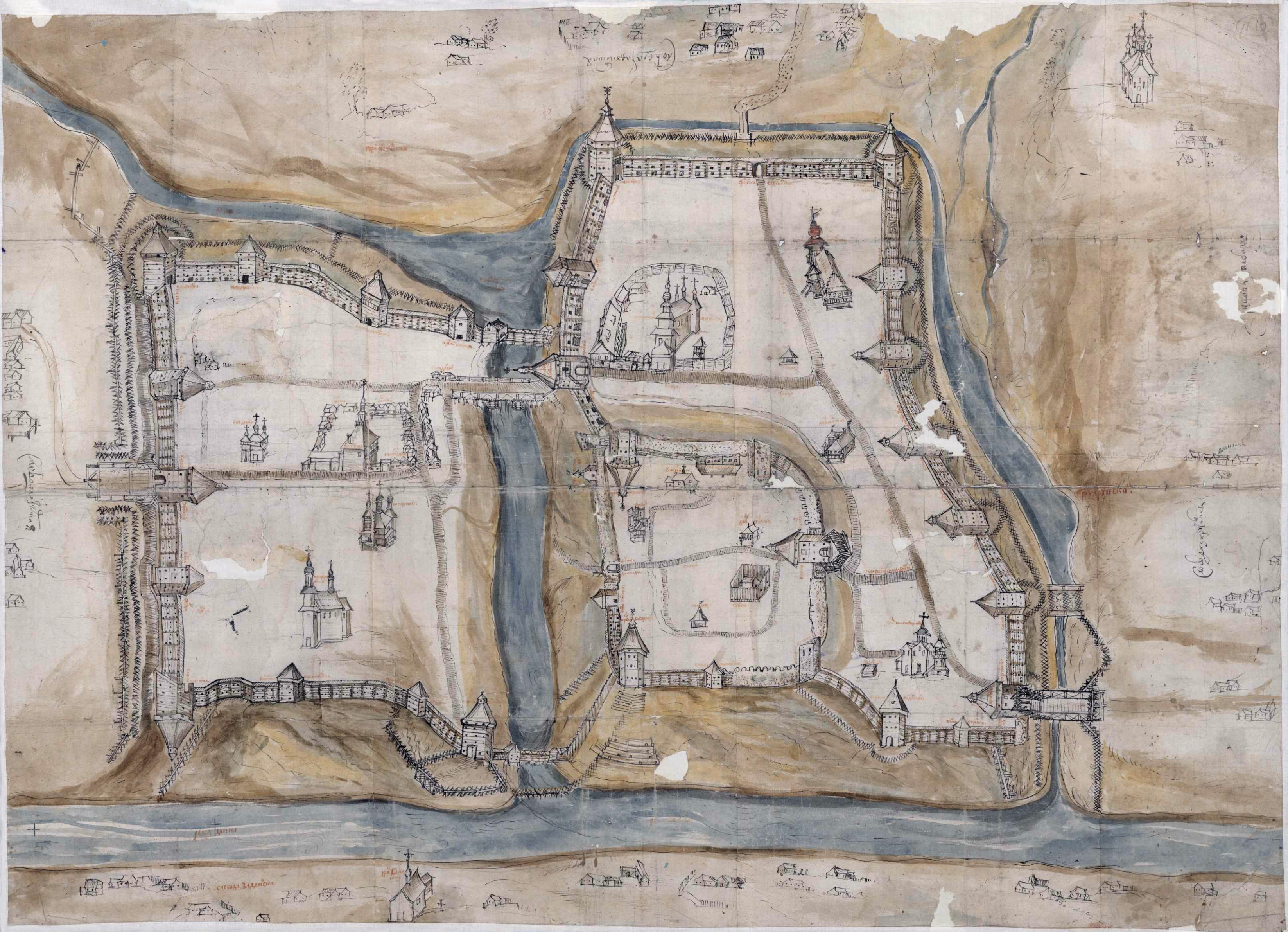 Беларуская (тарашкевіца): Віцебск (Viciebsk). Рысунак места